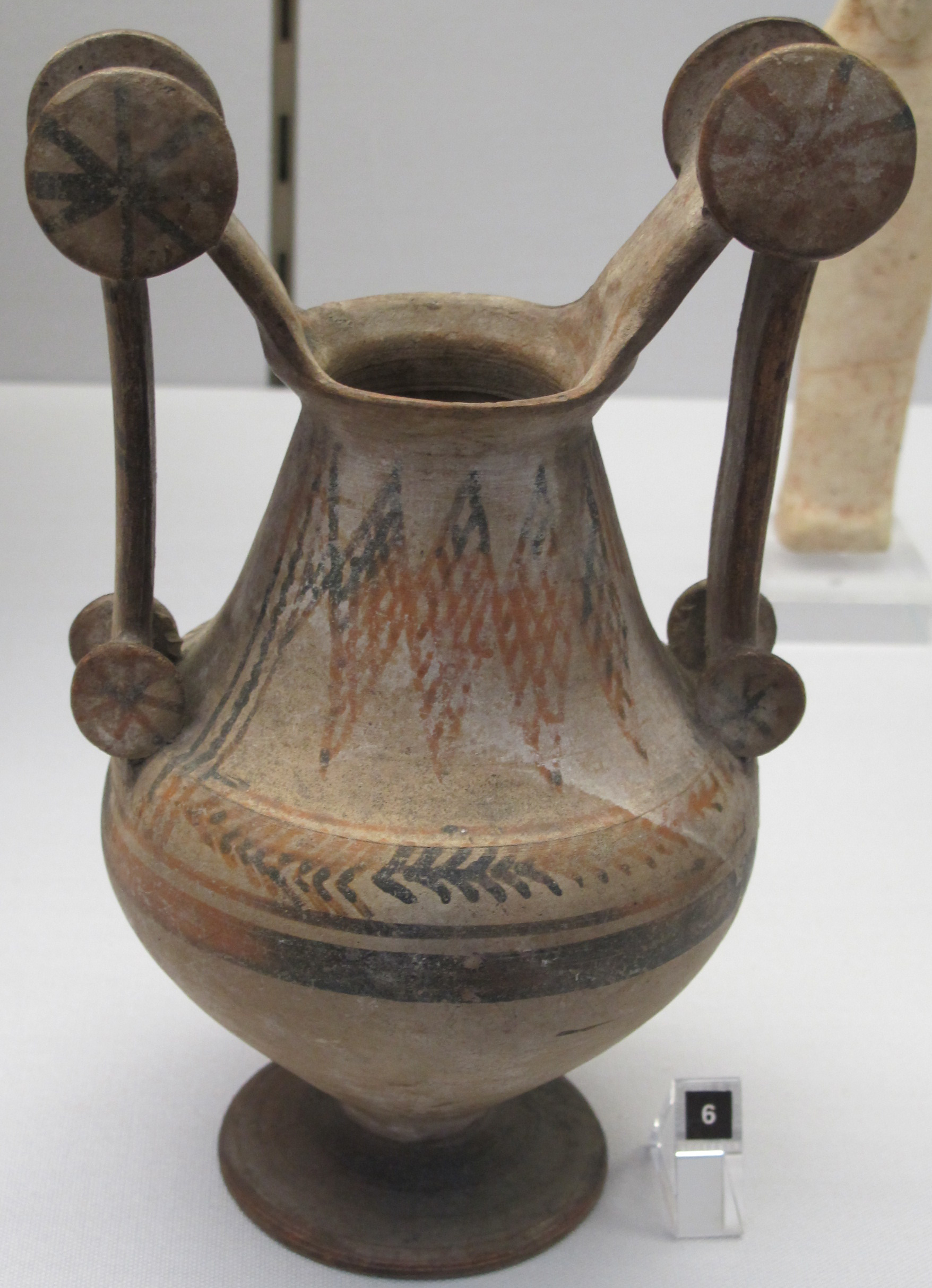 Messapia, trozella, fine IV-inizio III sec ac.